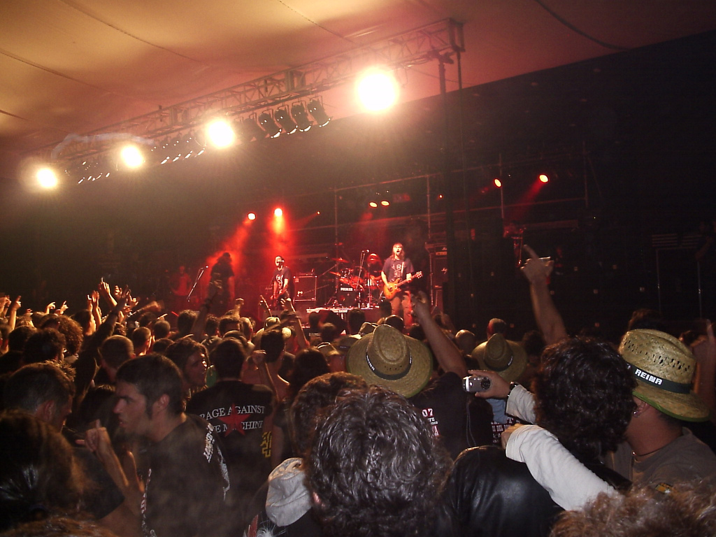 Boikot en el LonjasRock07, Puerto de la Cruz, Tenerife